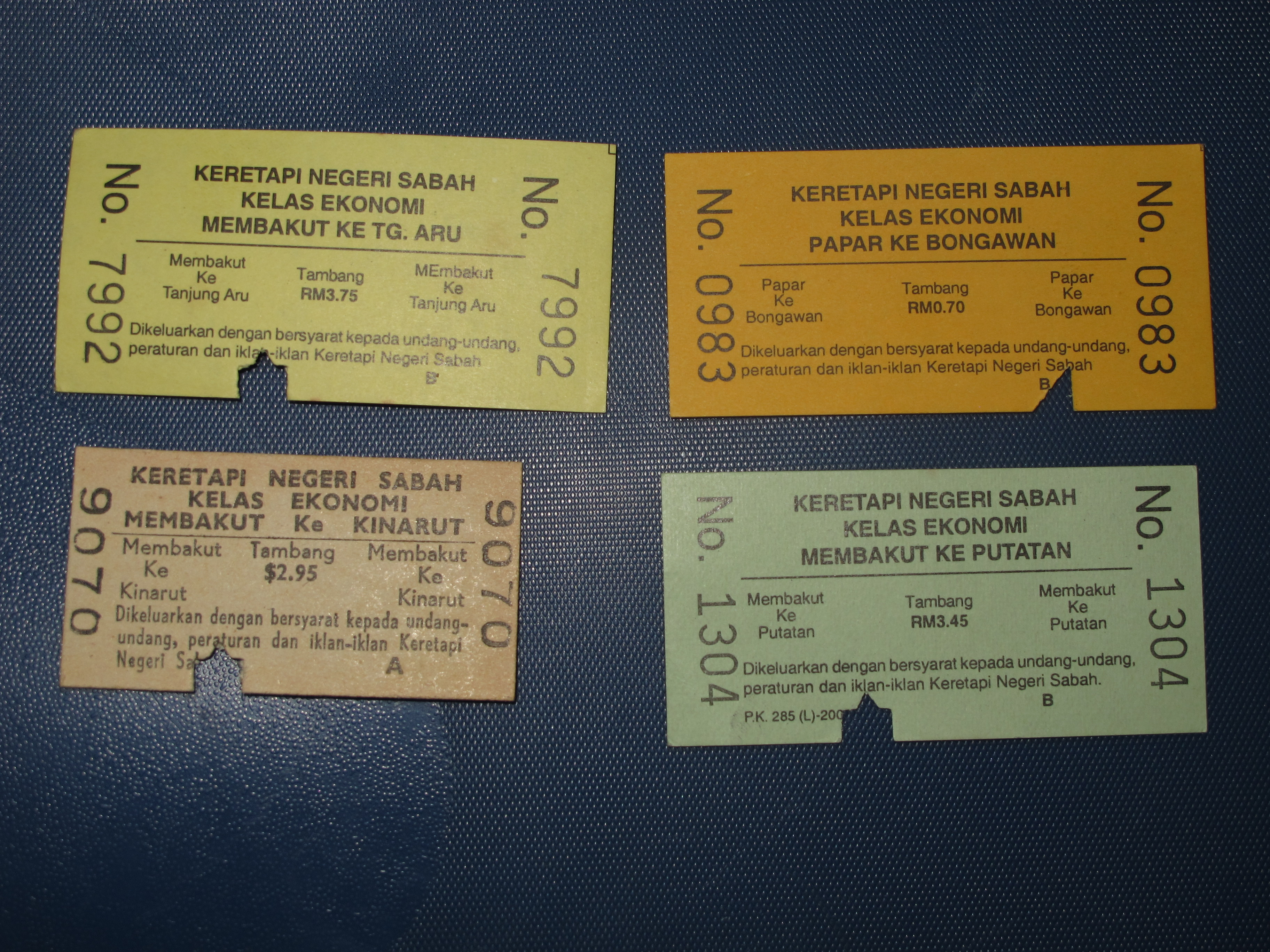 Verschiedene entwertete Kurzstreckentickets der Sabah State Railway